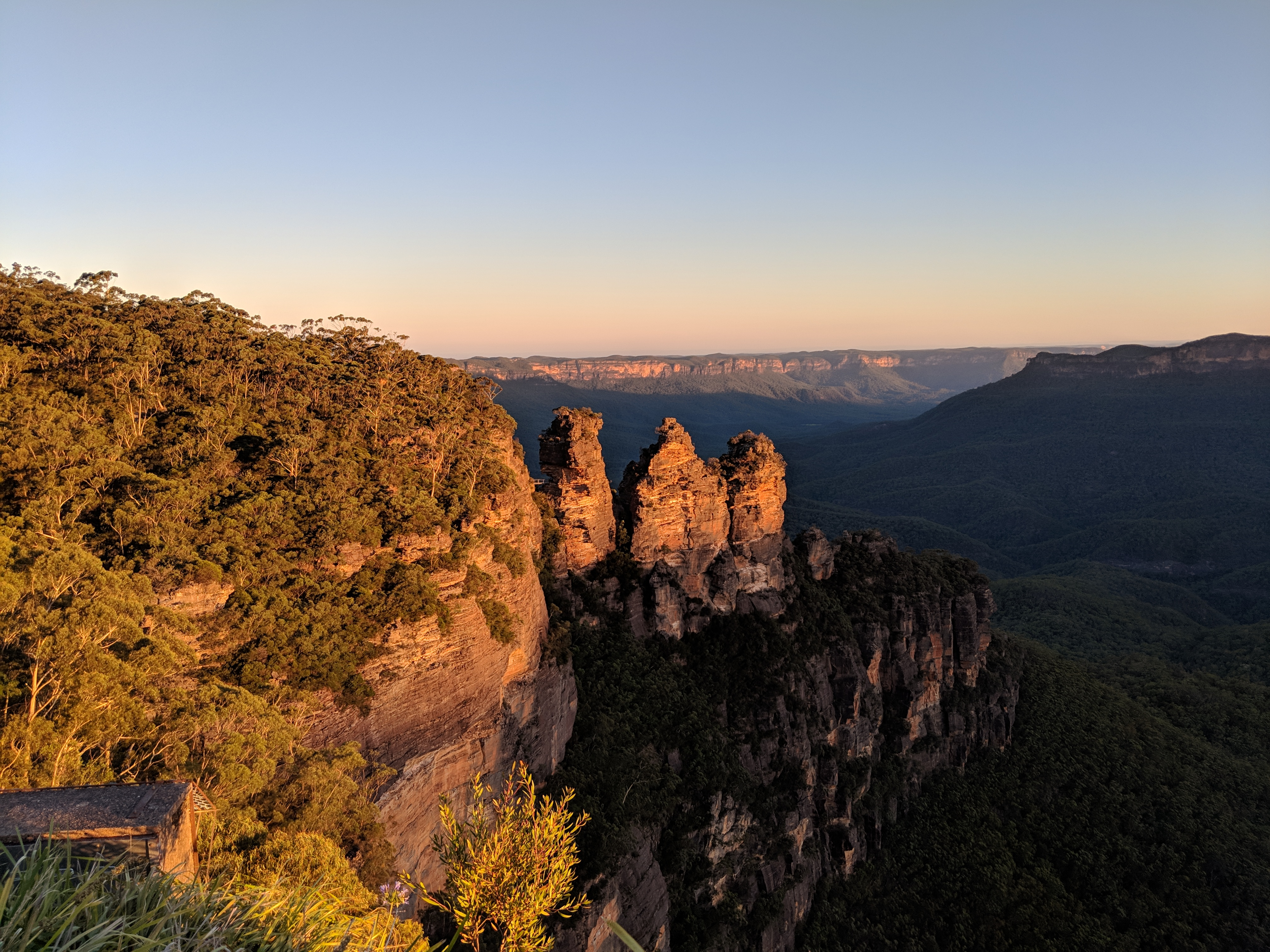 Three Sisters in der Abenddämmerung.